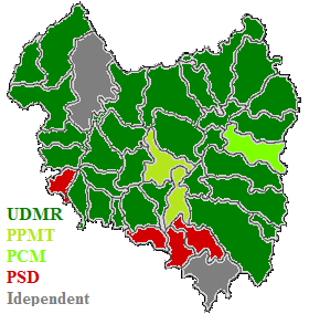 Harta Politica .